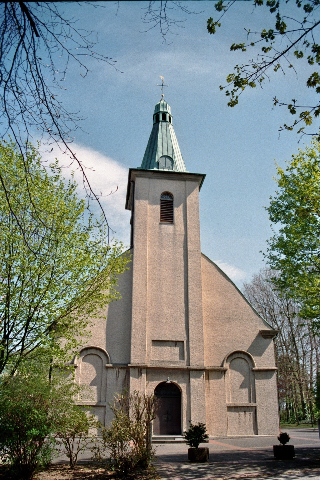 Turm der katholischen Kirche St. Peter und Paul Unna-Hemmerde.